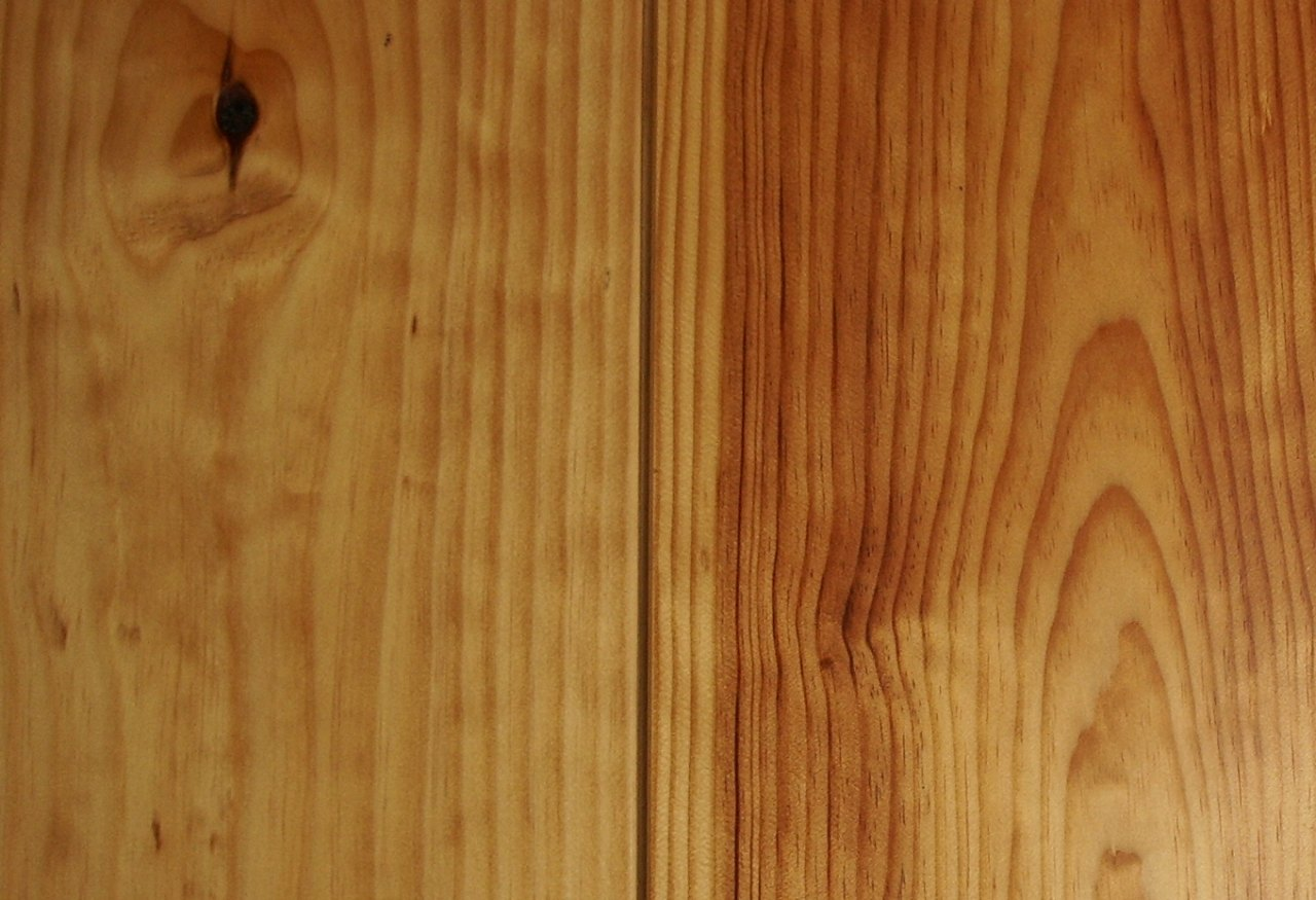 Dielen aus Seekiefer "Pin des Landes", geölt